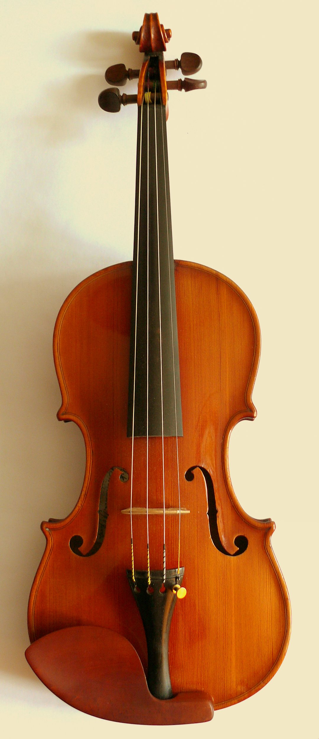 violin made by Aleksander Januszek in Piotrków Trybunalski (Poland, 1901)